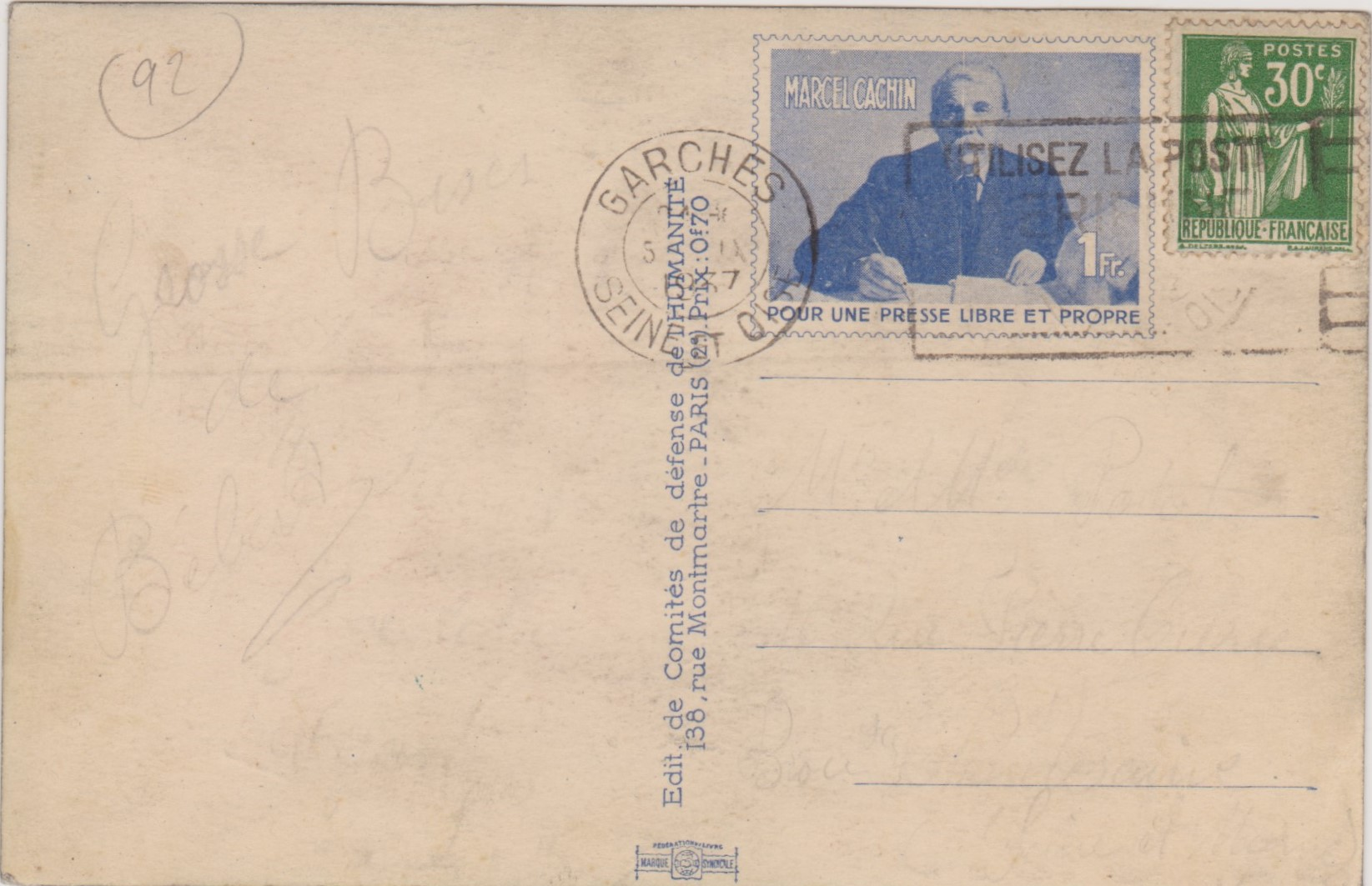 Vignette d'illustration : Marcel Cachin, "pour une presse libre et propre". Carte édité par le Comité de défense de l'Humanité (CDH) vendue aux participants pour expédition à leurs famille ou amis.